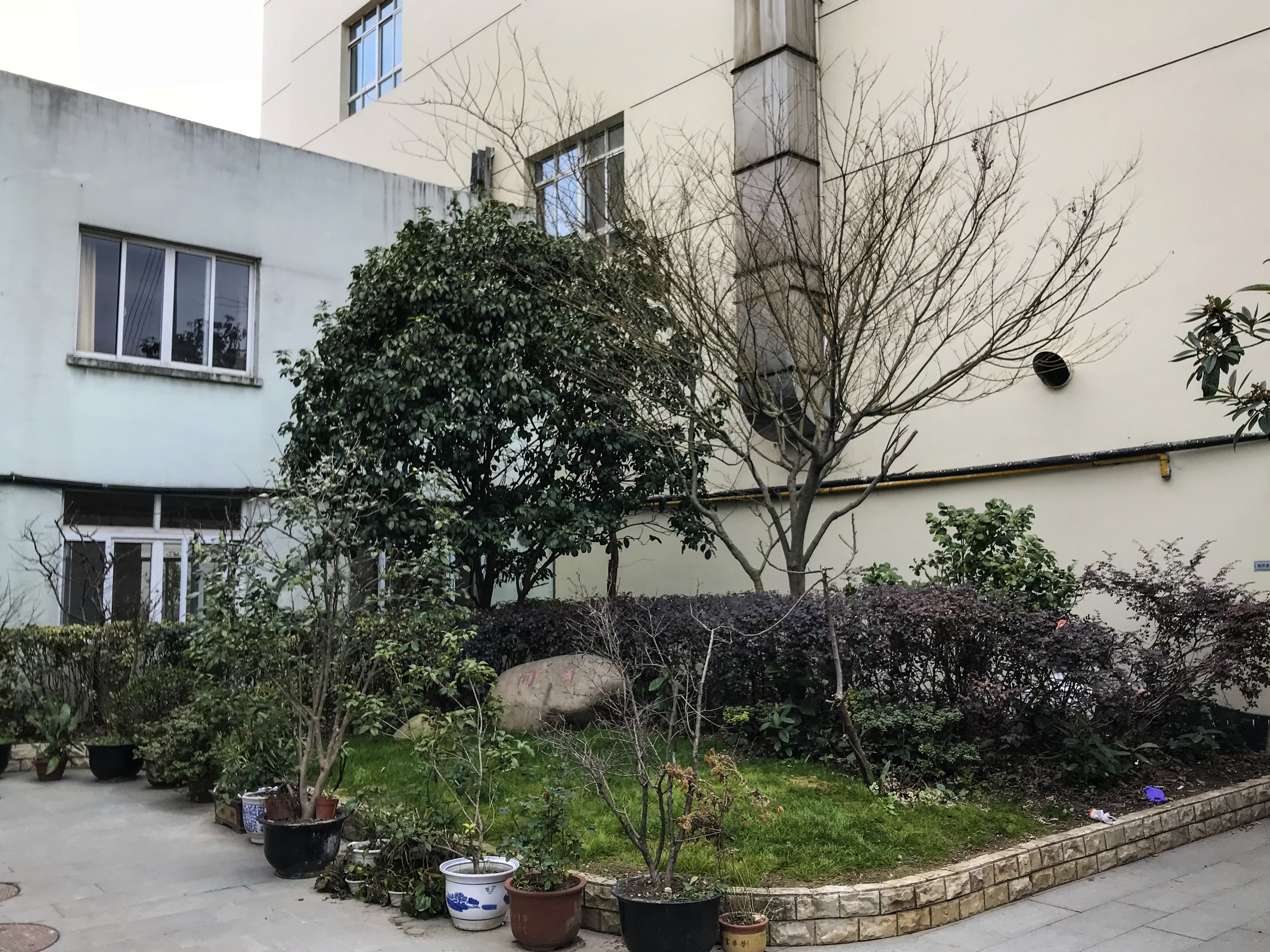 圣墓堂天主教公墓遗址 徽宁路216号